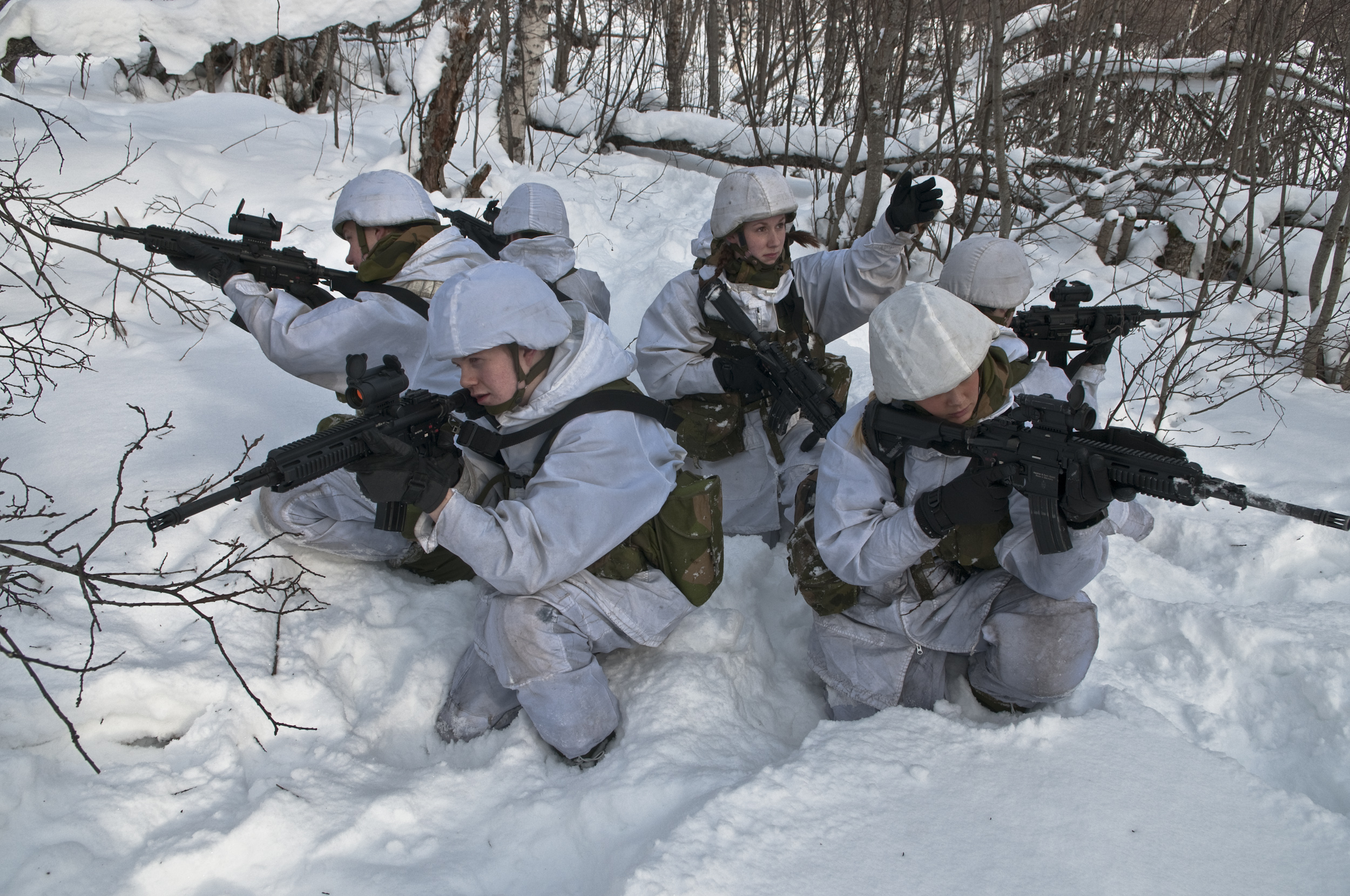 Soldater fra 2. bataljon danner et kringvern. Foto: Adrian Lombardo.